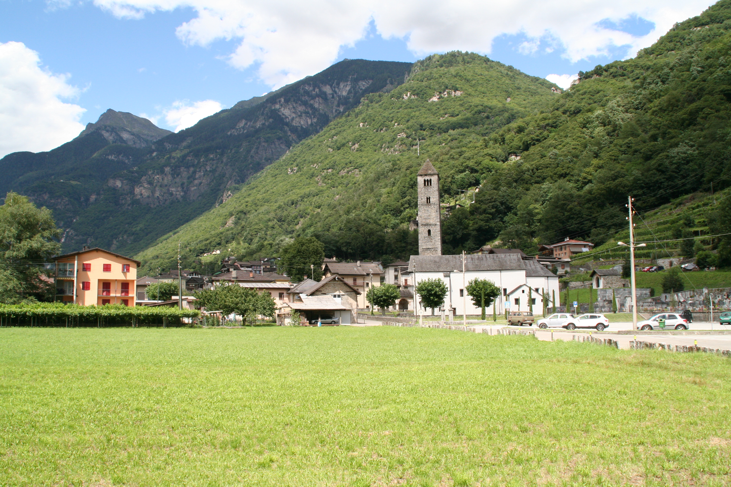 Malvaglia